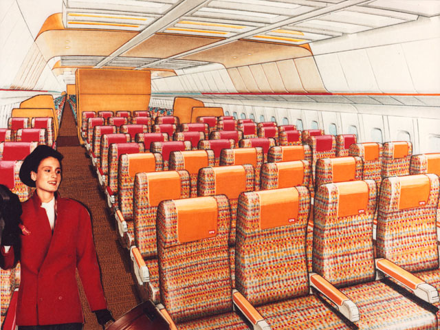 LTU: Interior-Design für die Lockheed L-1011 als Ferienflieger